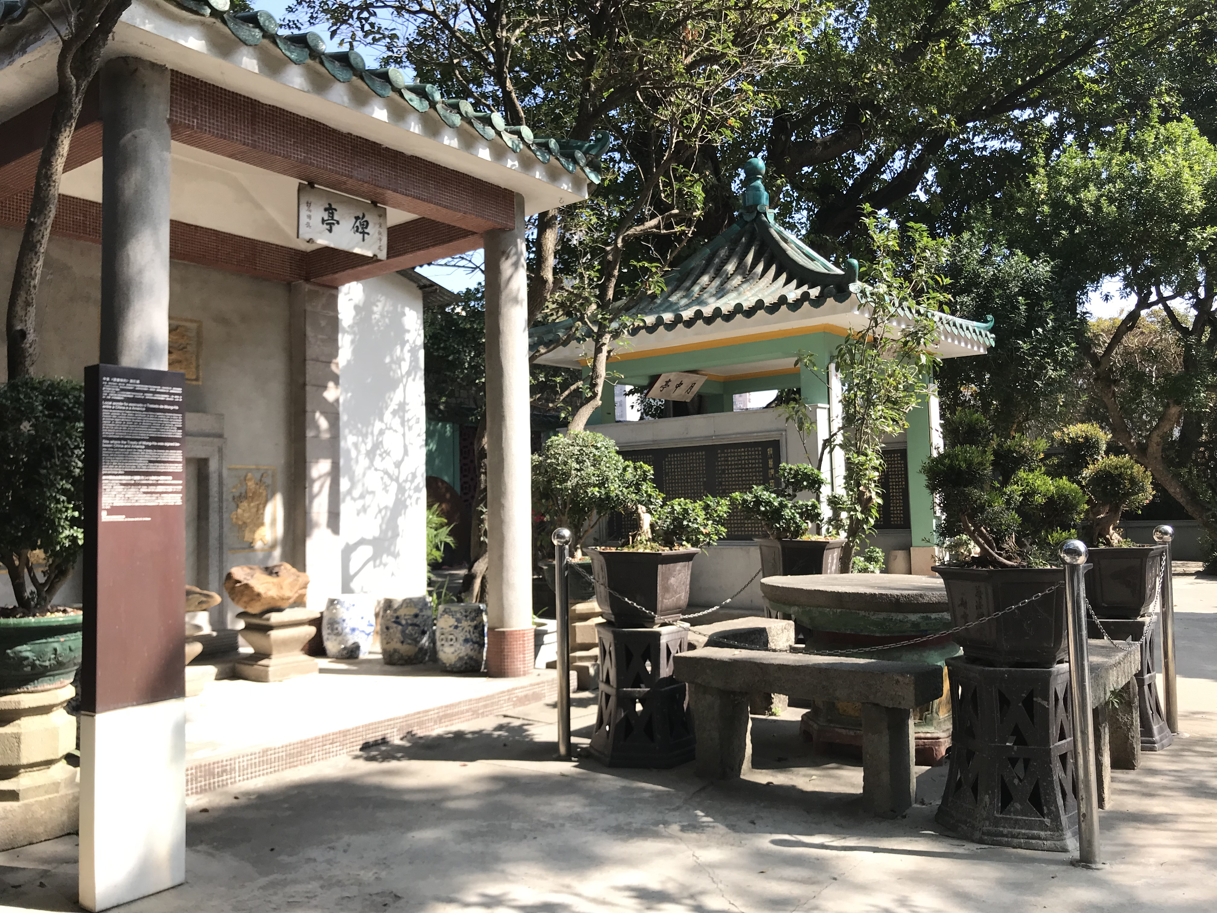 中文（台灣）: 位於普濟禪院的望廈條約簽訂處